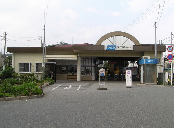 Hotarda Station on the Odakyu Odawara Line, Odawara, Kanagawa 螢田駅